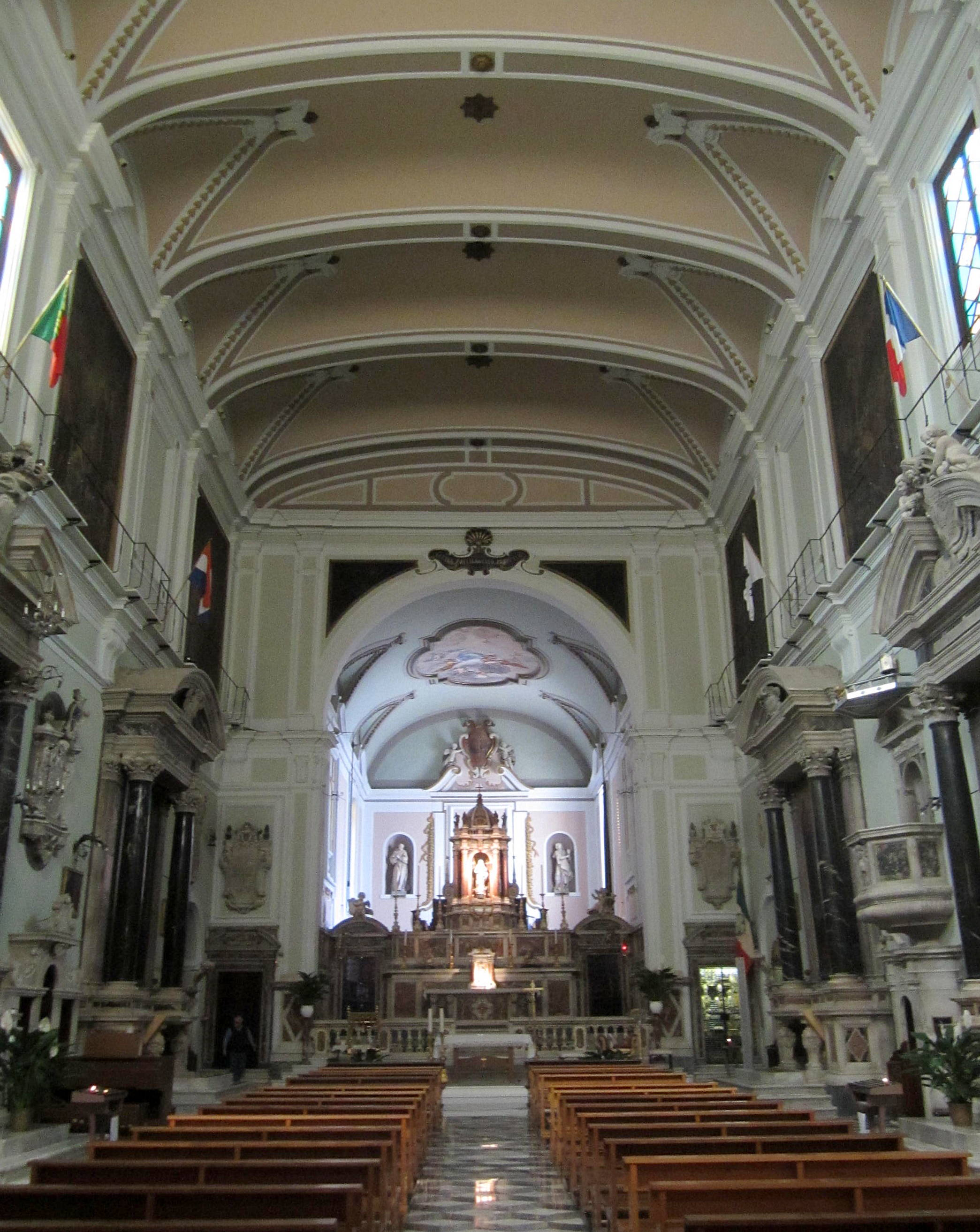 Interno della Chiesa della Madonna, Livorno